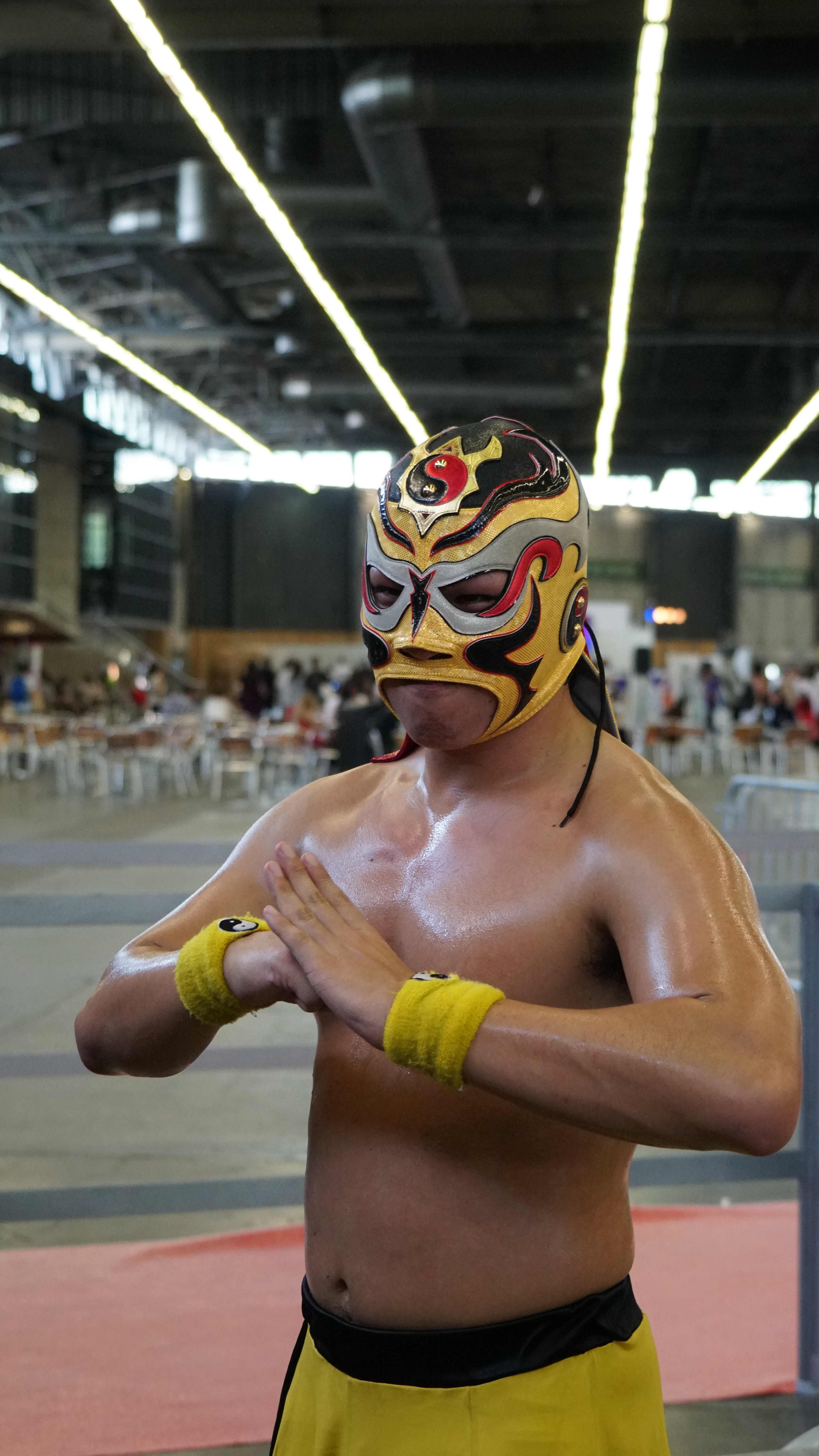 Le catcheur Andy Wu en 2017